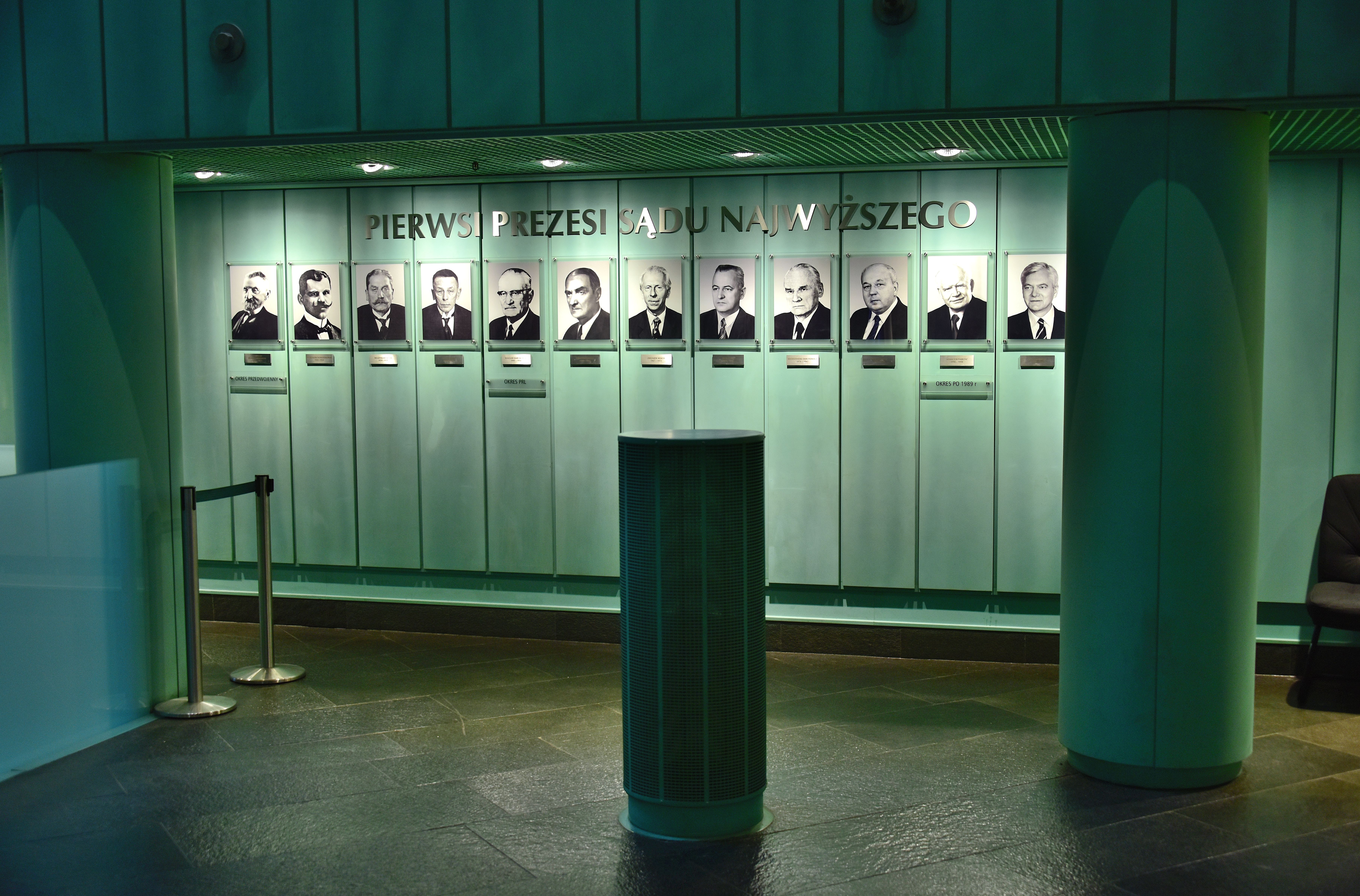 Hol gmachu Sądu Najwyższego w Warszawie. Pierwsi Prezesi Sądu Najwyższego